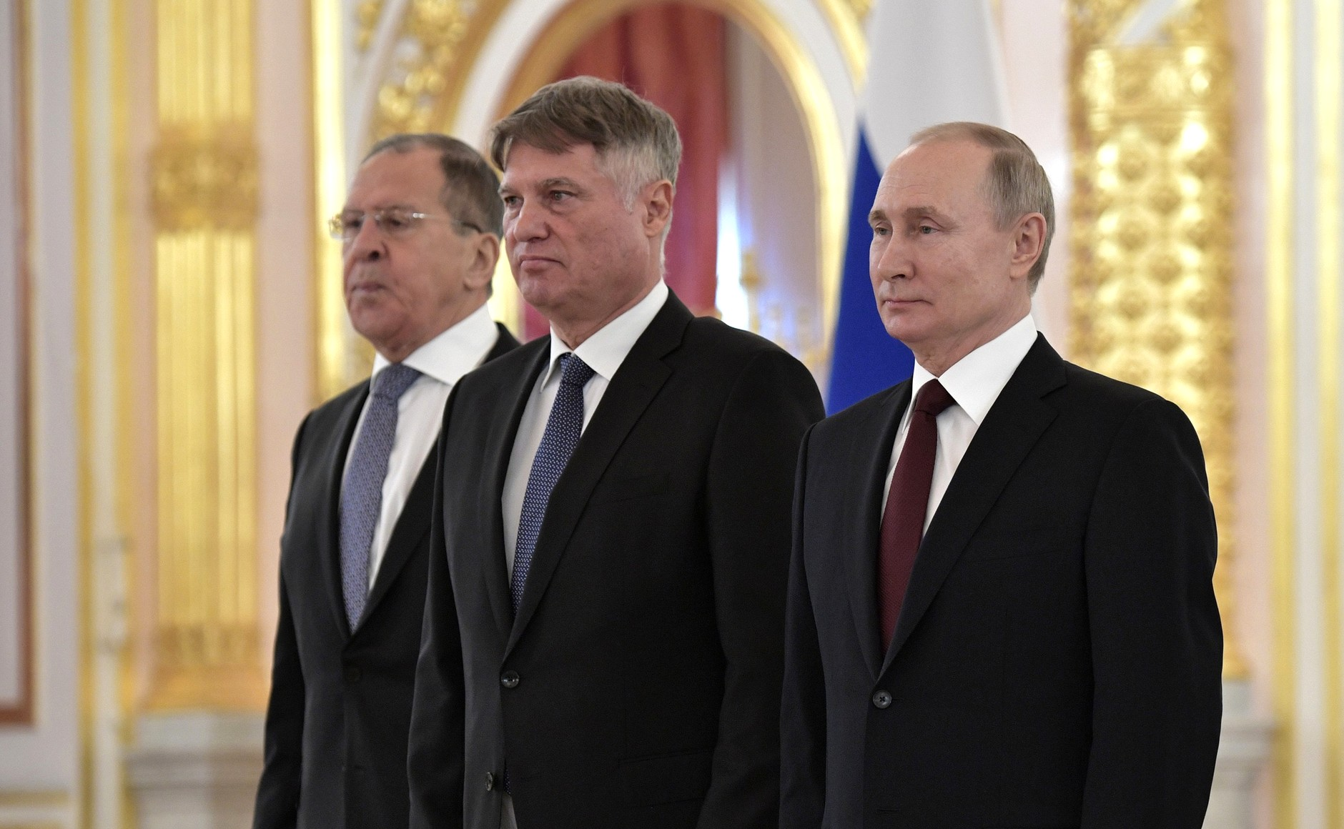 В Александровском зале Большого Кремлёвского дворца Владимир Путин принял верительные грамоты у послов ряда иностранных государств. На церемонии вручения верительных грамот. Верительную грамоту Президенту России вручил Мирослав Лазанский (Республика Сербия).